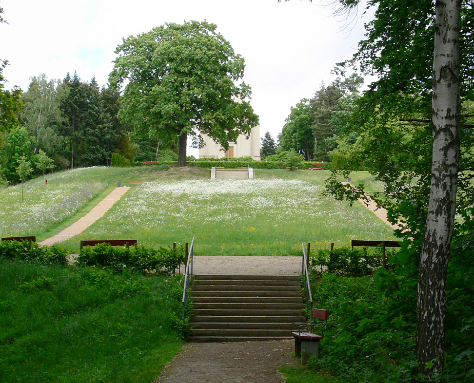 Der an die Anlage des Heiligen Grabes angrenzende „Ölberg (mit „Ölbaum“, „Jüngerwiese“ und dem Krematorium von 1913), Görlitz